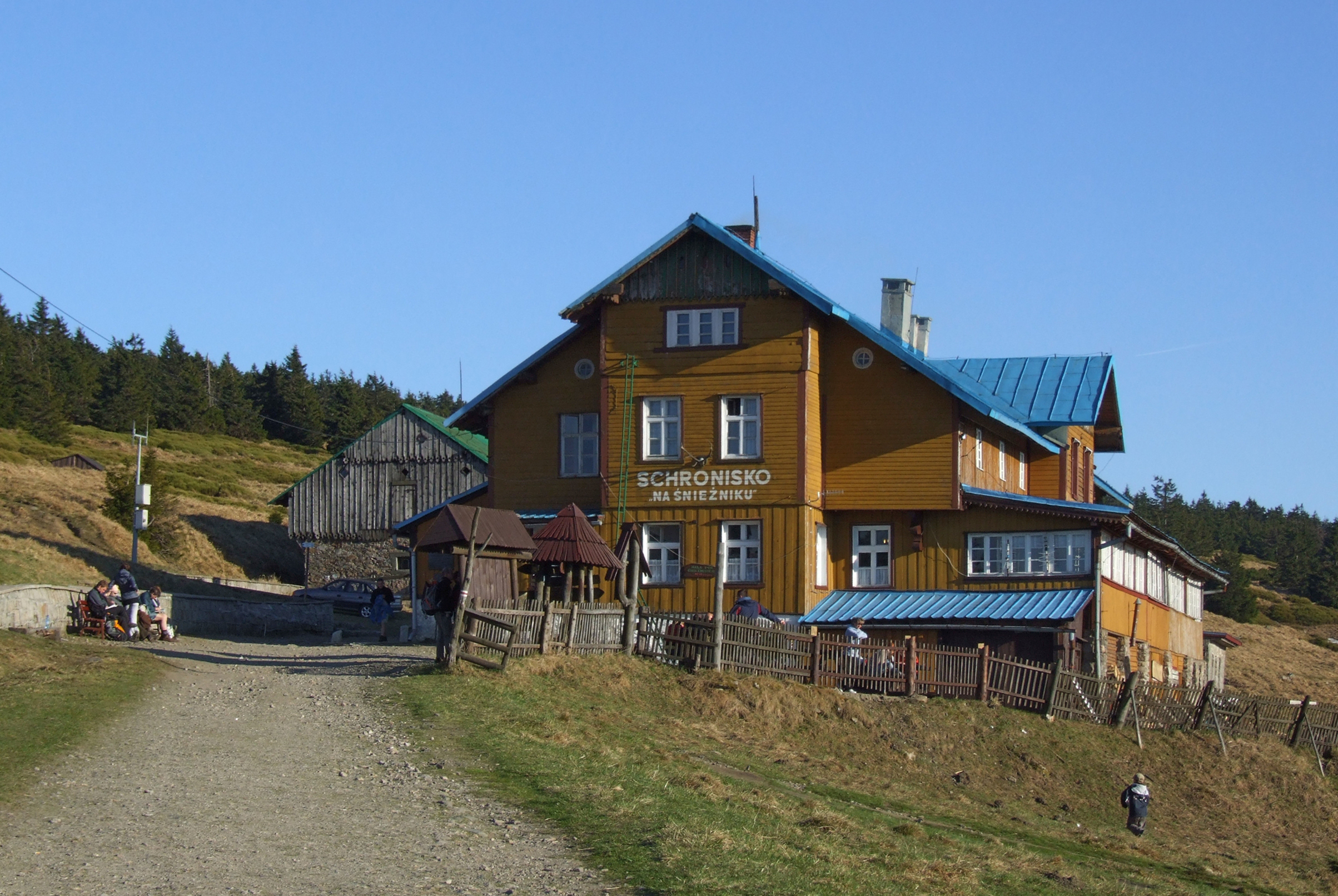 Schronisko "Pod Śnieżnikiem"